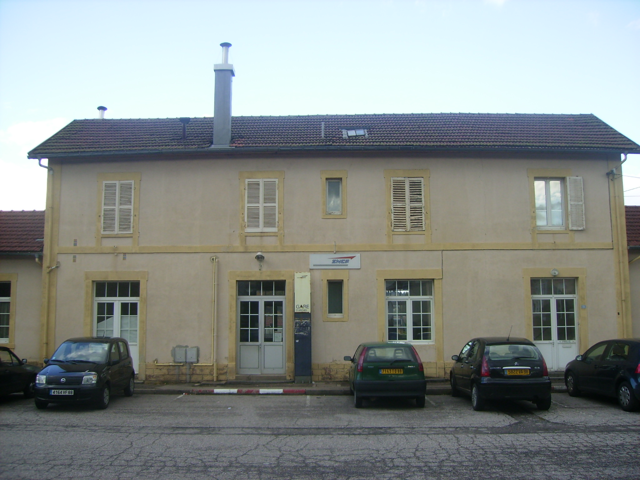 Facade de la gare d'Arches